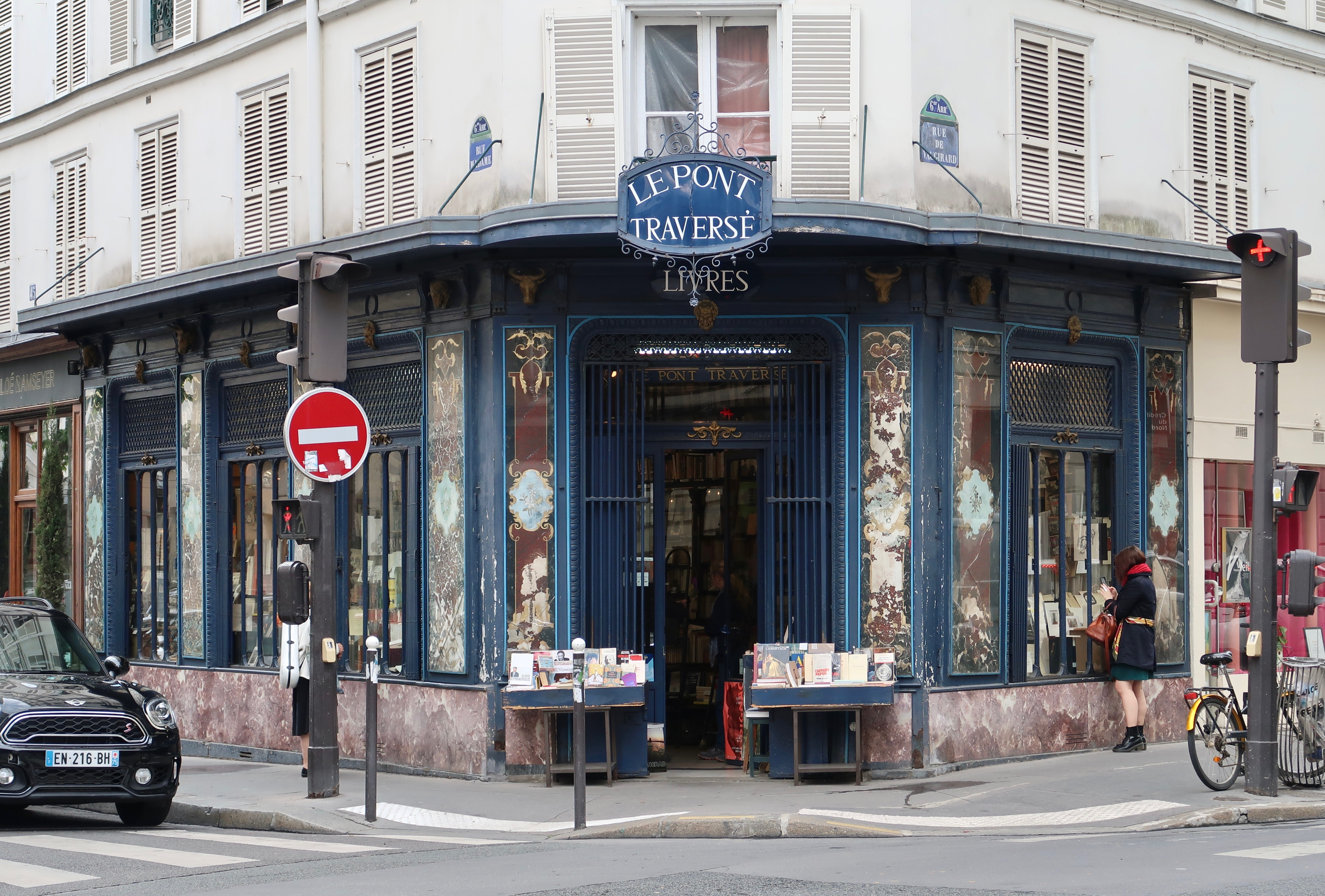 Le Pont traversé, 62 rue de Vaugirard (Paris, 6e).